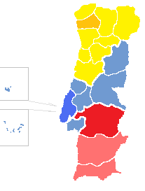 Mapa de las diócesis de Portugal. En gris oscuro las archidiócesis.